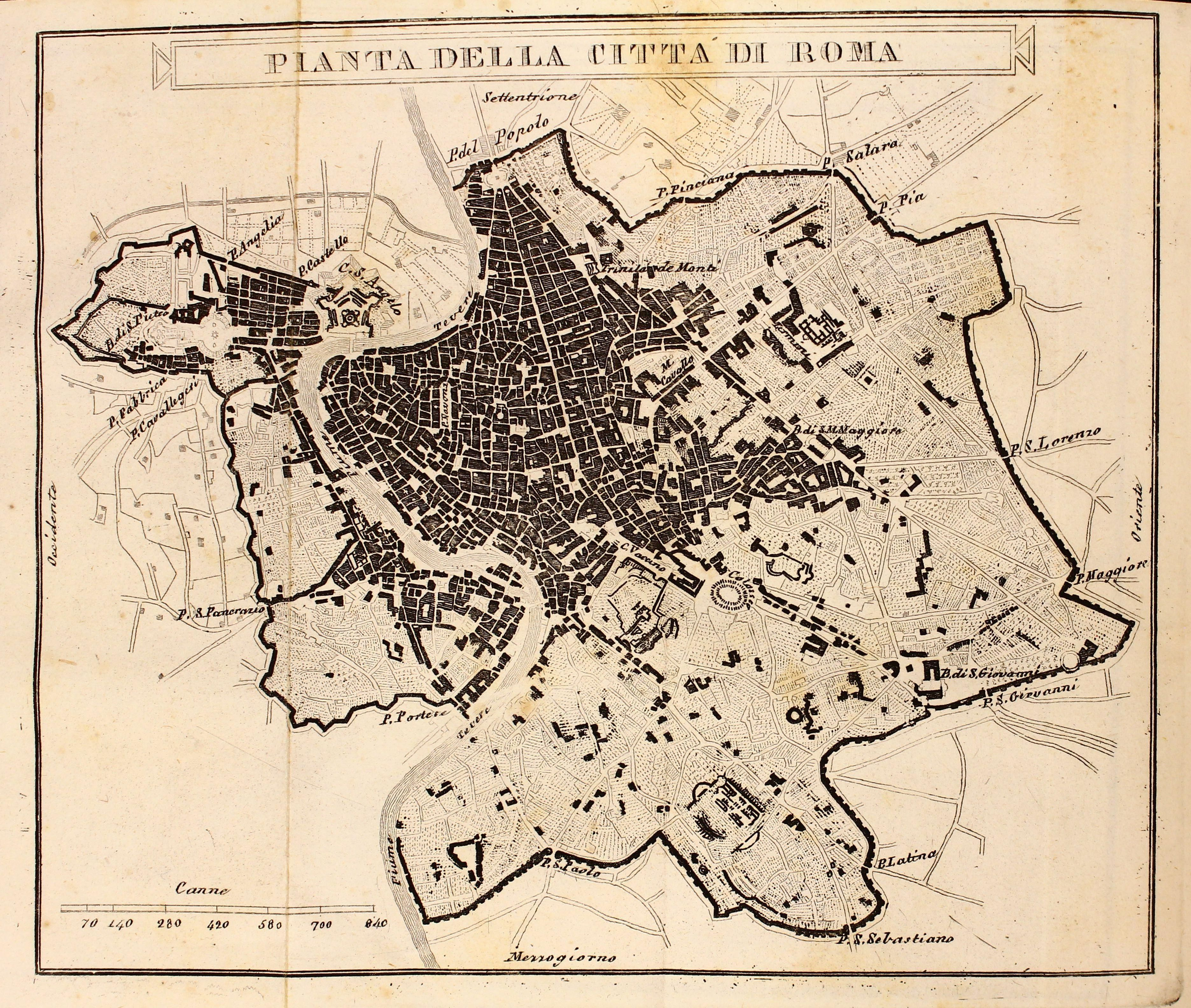 Autor: Nibby, Antonio, 1752-1839 Descripción bibliográfica: Itinéraire de Rome et de ses environs / crédigé par A. Nibby ... d'après celui de feu M. Vasi. - Rome : Propriété d'Augustin Valentini ... , 1838-1839. - 2 v. (XL, 266, [2]p., [24] lam. de grab., [1] map. pleg. ; 324 p. [16] lam. de grab.) : il. ; 19 cm Materia: Roma (Italia) - Descripciones - Guías Notas: H. de grab. calc. Editor: Valentini, Agostino Localización: Libro completo en pdf